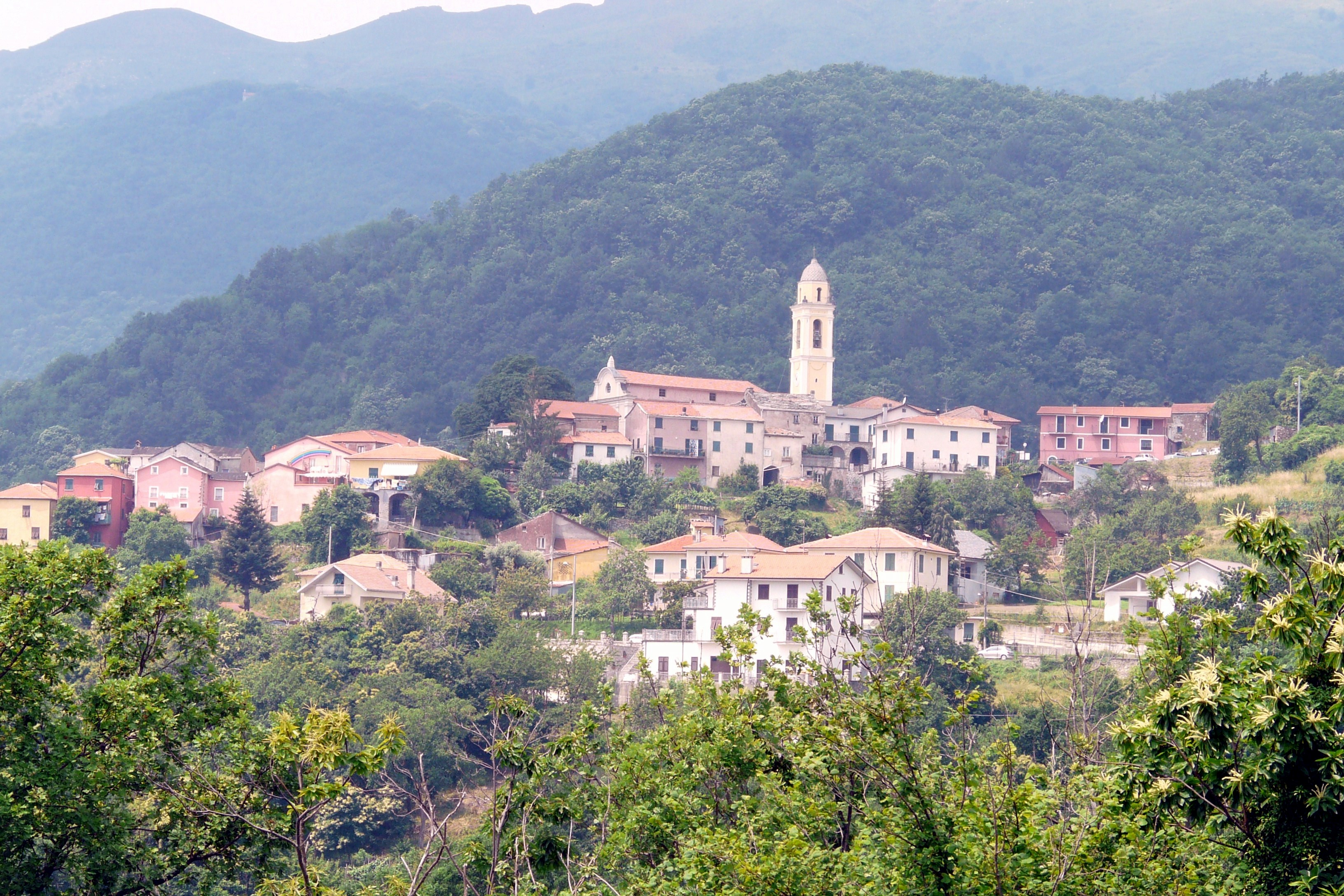 Panorama di Ossegna, Maissana, Liguria, Italia